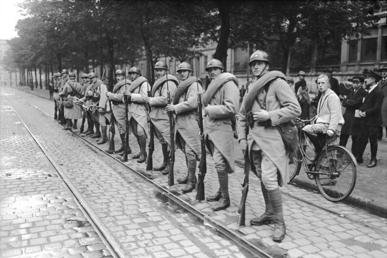 Die Räumung der Zone Dortmund-Hörde durch die Franzosen! Die Räumung dieser Zone lt. Annahme der Dawes-Gesetze geht sehr langsam und unauffällig vor sich. Die Truppen verlassen die Stadt in Gruppen bis zu 20 Mann unter Führung eines Korperals in der Richtung Düsseldorf. ( Neueste Aufnahmen wurden von einem von uns nach dorthin gesandten Sonderbildberichterstatter photographisch festgehalten). Marschfertiges französisches Militär erwartet in den Strassen Dortmunds den Befehl zum Abmarsch.